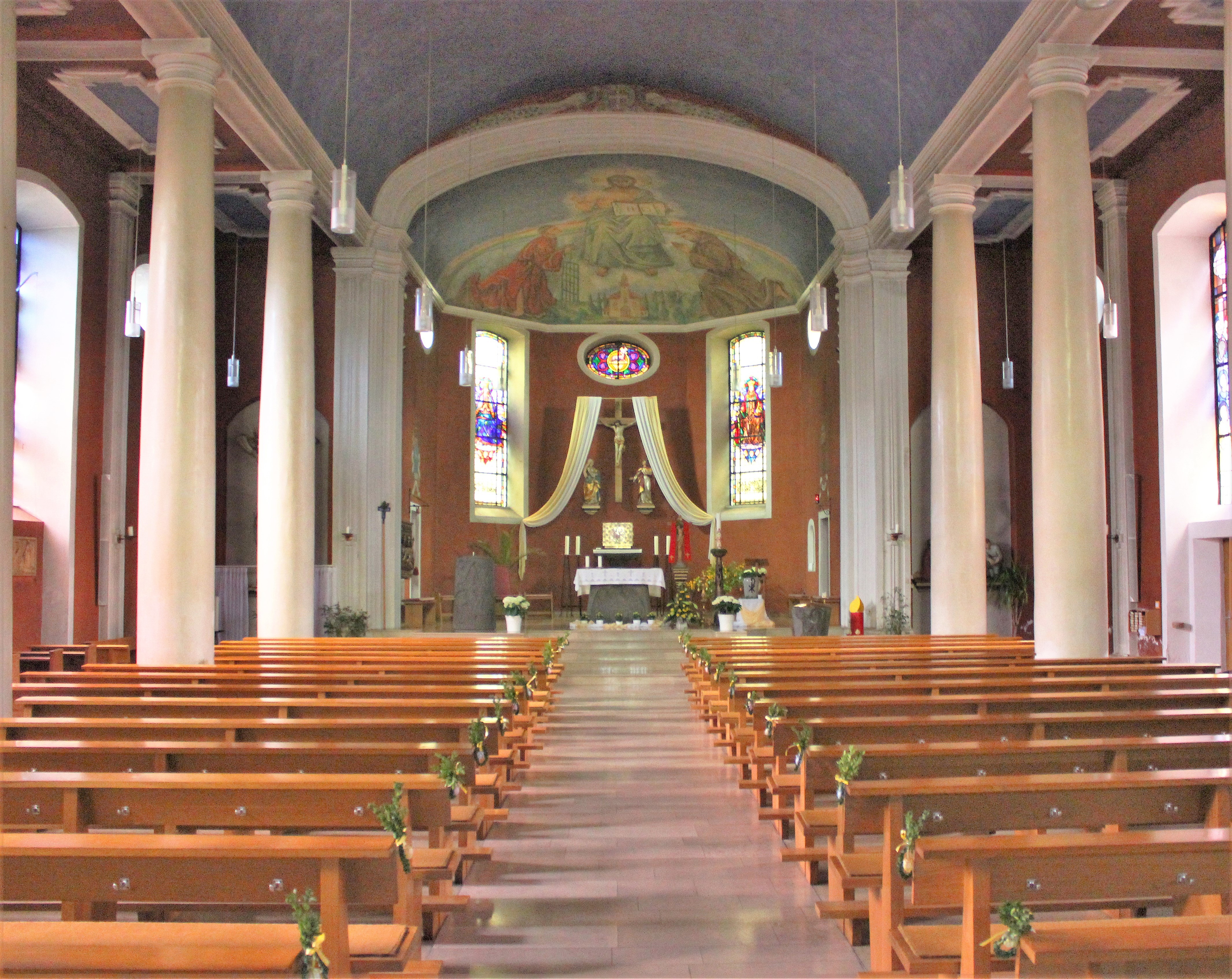 Blick ins Innere der katholischen Pfarrkirche St. Laurentius in Welschbach, einem Ortsteil der Gemeinde Illingen, Landkreis Neunkirchen, Saarland